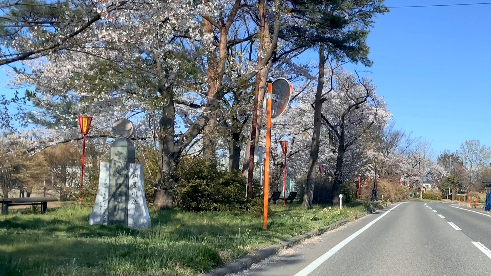 新潟県道264号豊栄天王線（葛塚東部緑道・旧銅屋川 さくら通り） 新潟市北区（2020年4月）